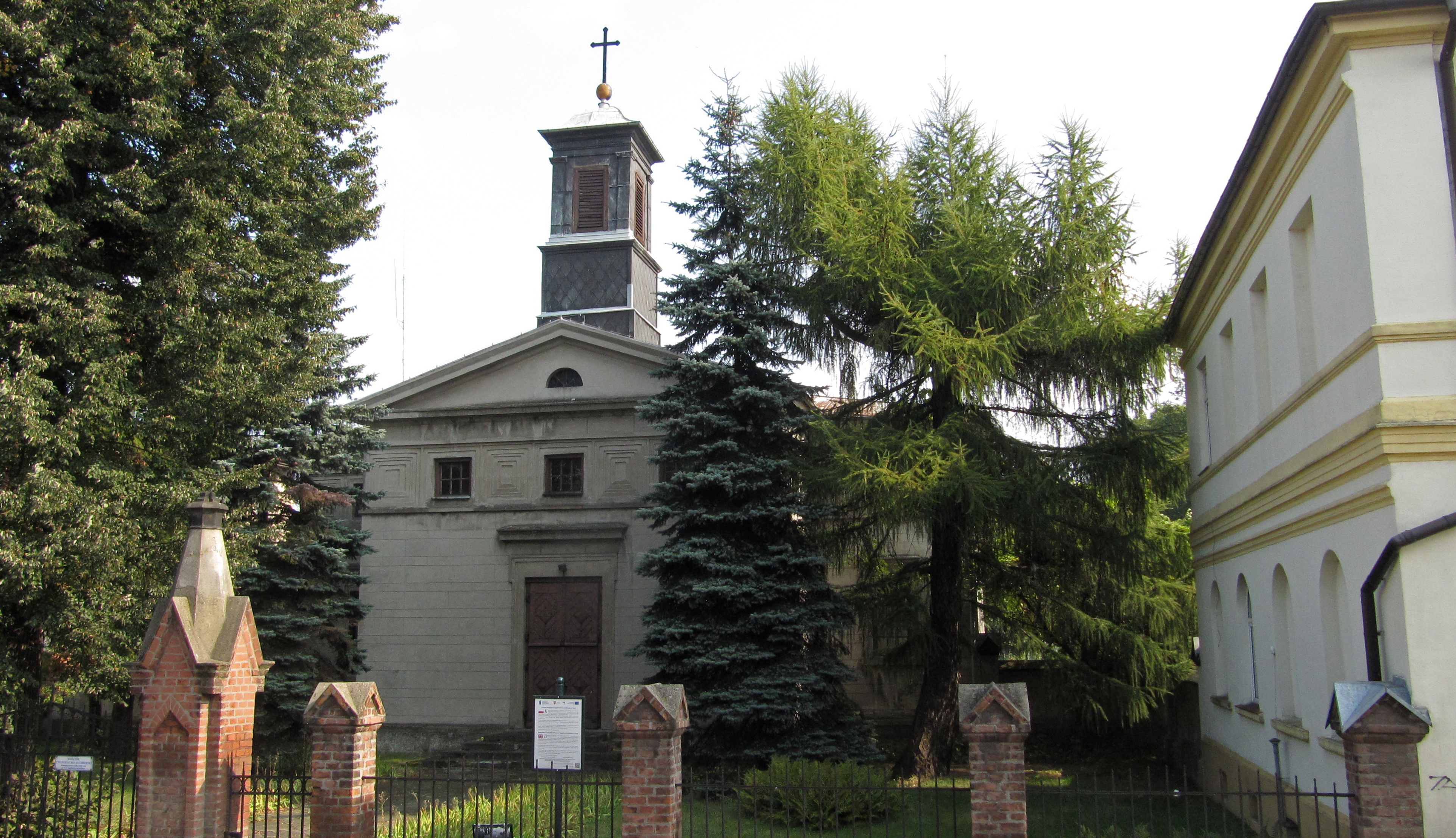 Evangelische Kirche in Turek, 2014